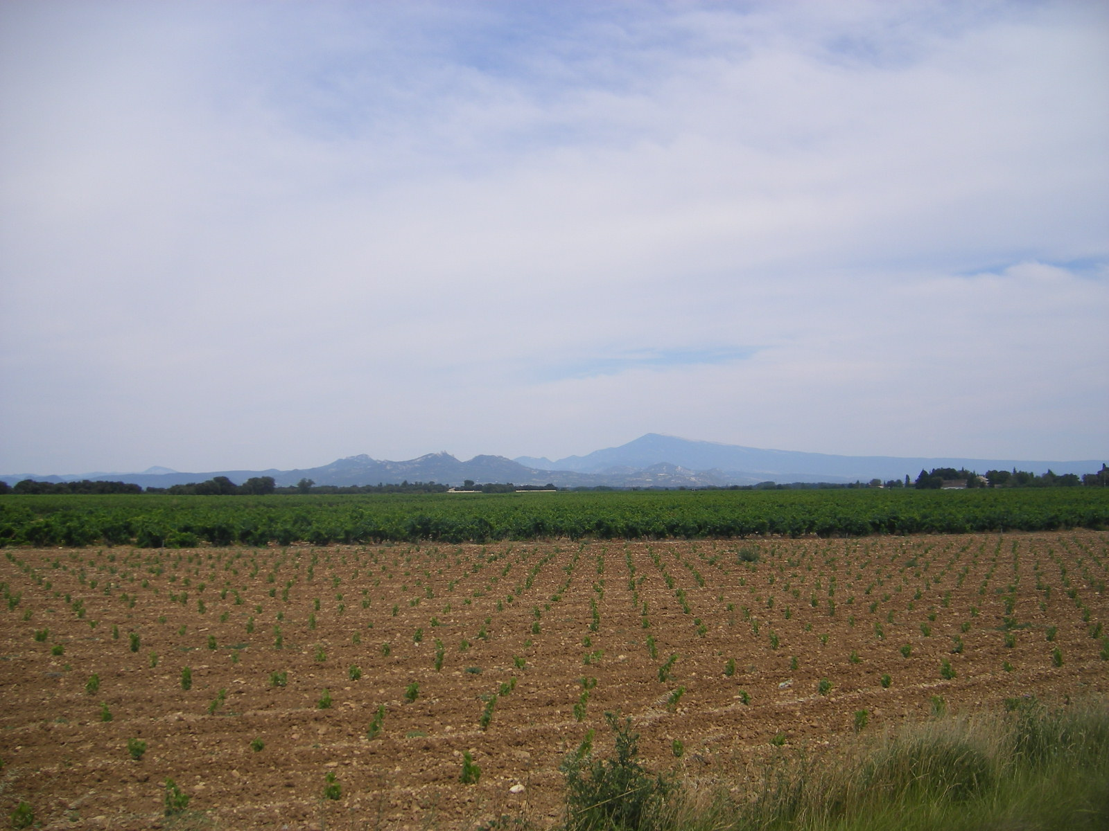 Landscape between Jonquieres and Orange